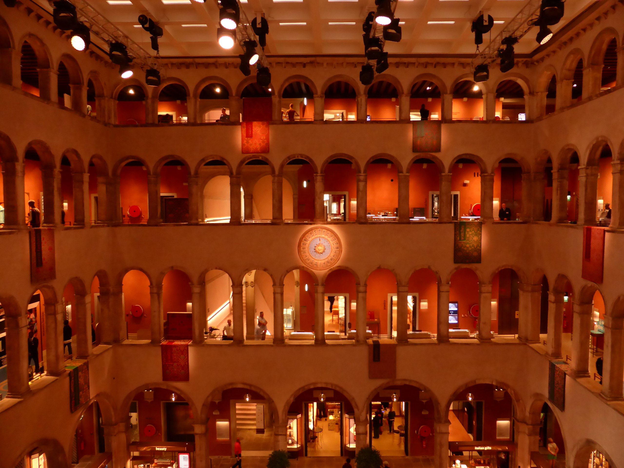 Innenhof des Fondaco dei tedeschi heute